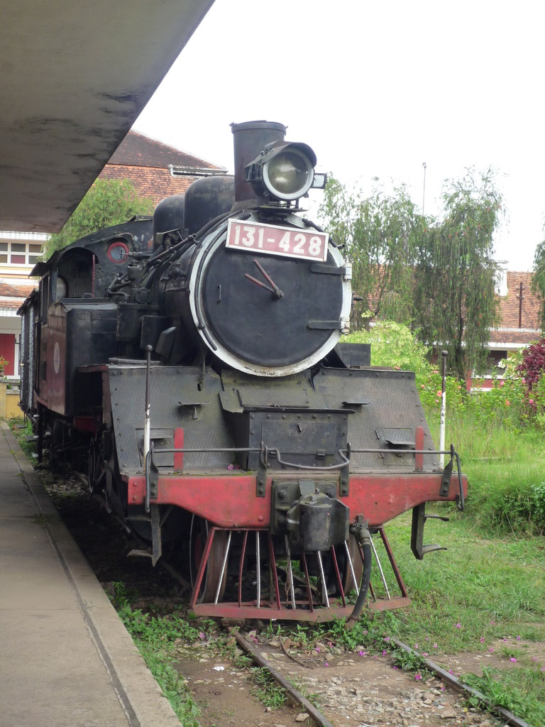 La Gare de Dalat en Vietnam.